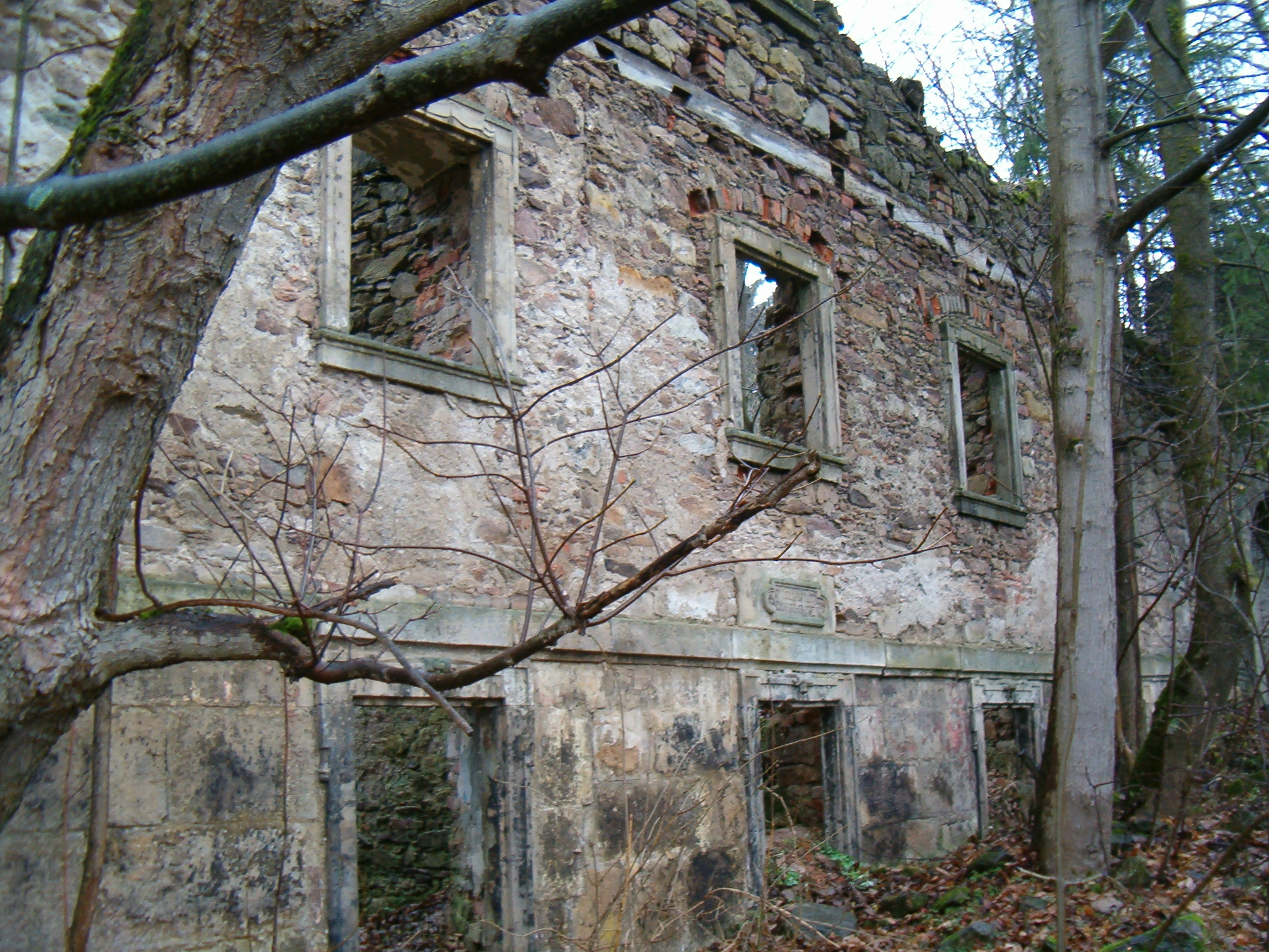 Niemojów - ruiny Dworu sołtysów z 1576 roku położone w dolinie Dzikiej Orlicy (zabytek, nr rejestr. A/4424/765)